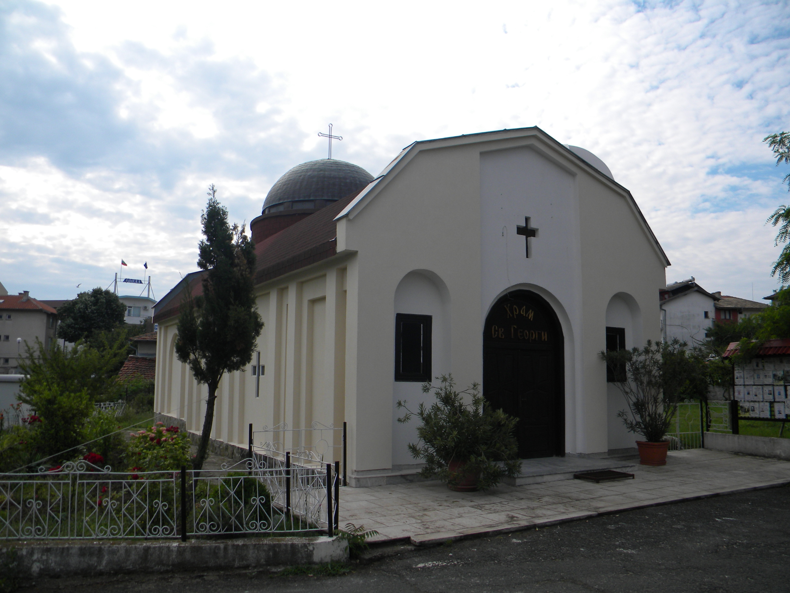 Църквата "Свети Георги" в Лозенец